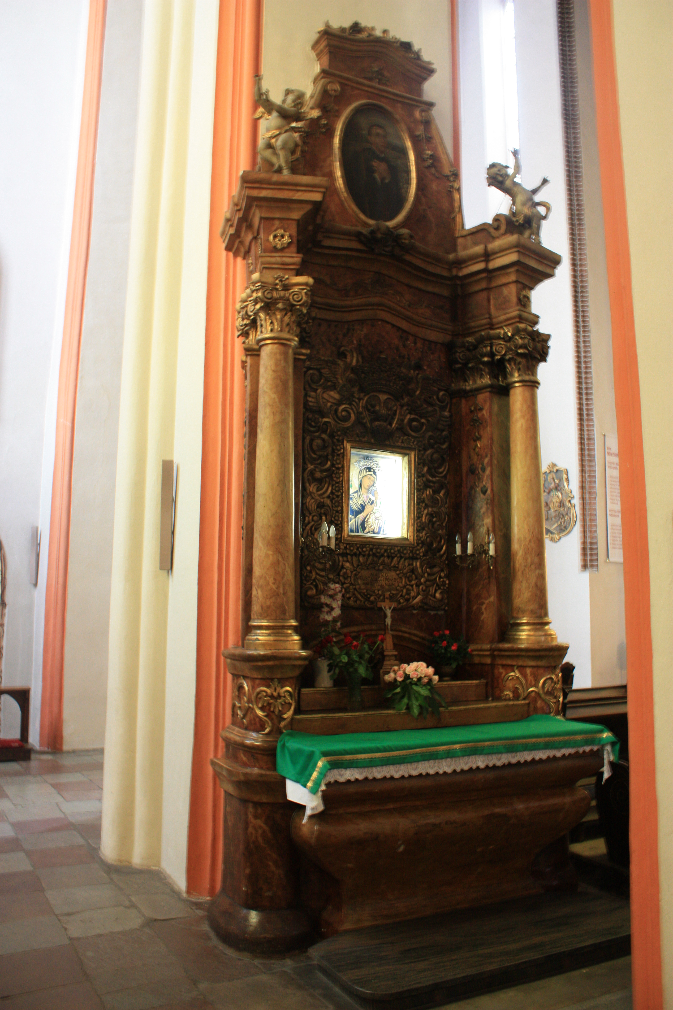 Kościół Bożego Ciała w Poznaniu. Boczny ołtarz Matki Boskiej Nieustającej Pomocy.